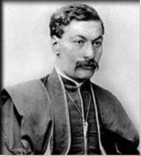 Ներսես Թահիրյան (1887–1902)